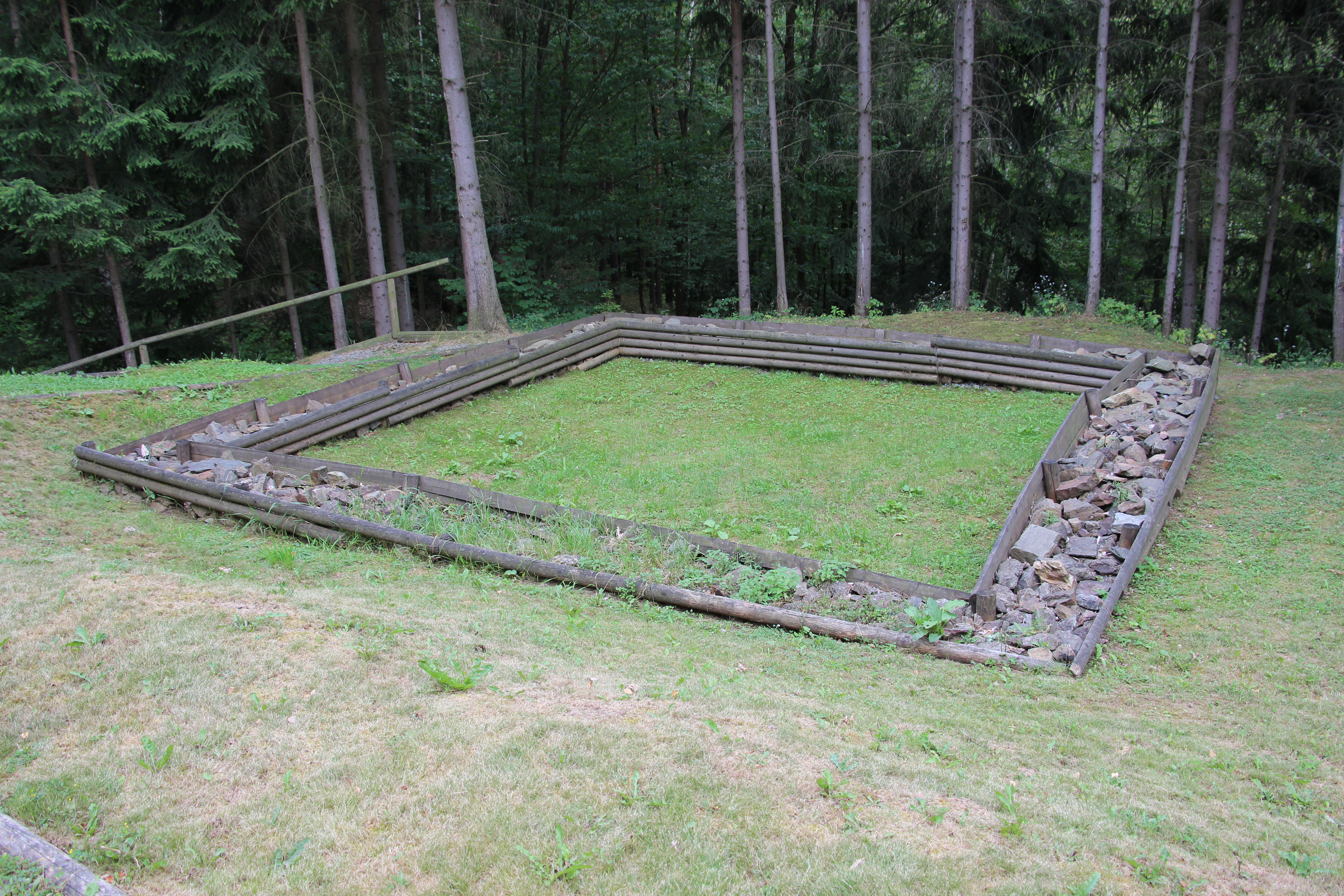 Vrchol s památkově chráněnou zříceninou hrádku Rumberk nad stejnojmennou vesnicí v okrese Blansko.